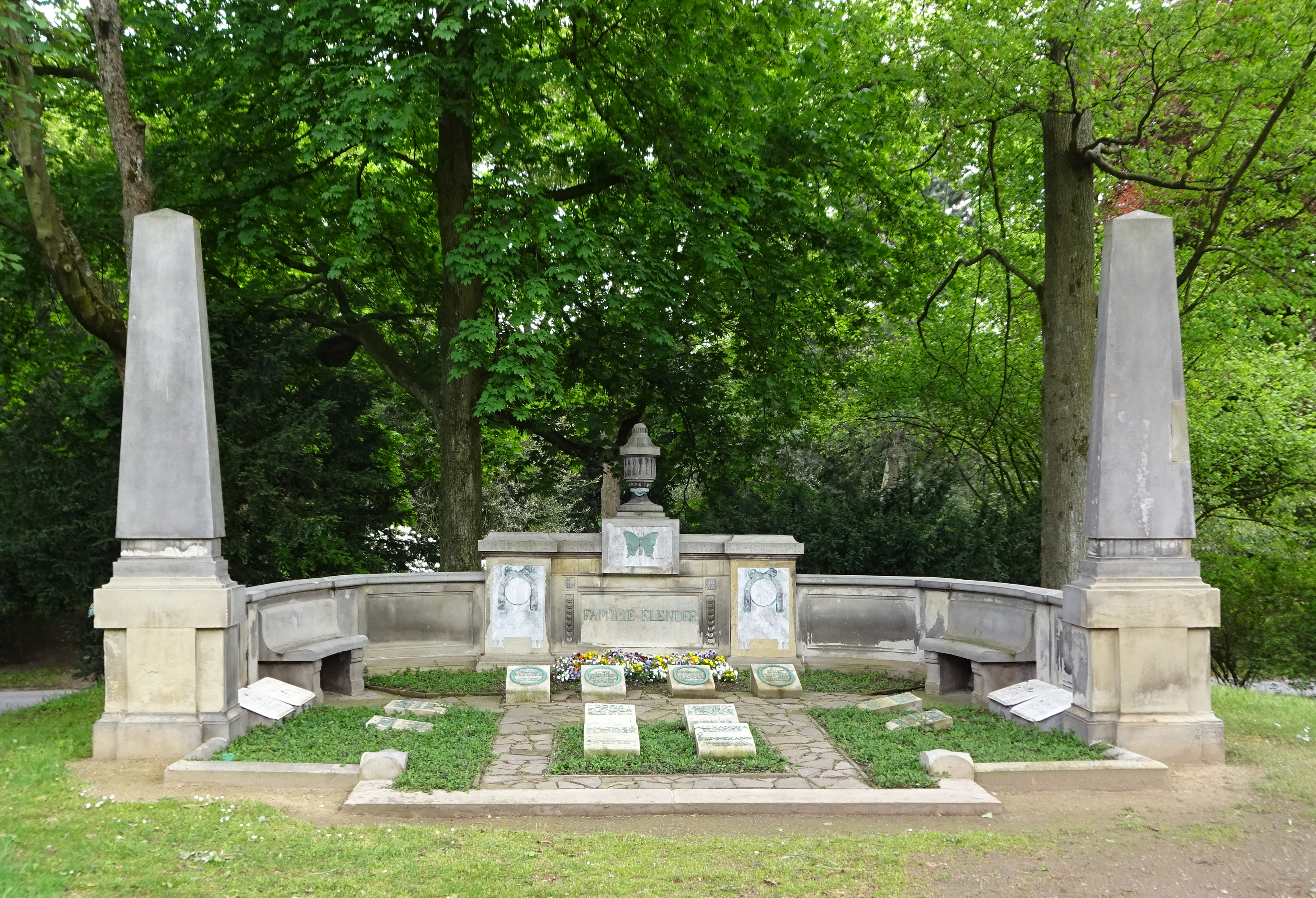 Grabstätte Familie Flender, Nordfriedhof Düsseldorf